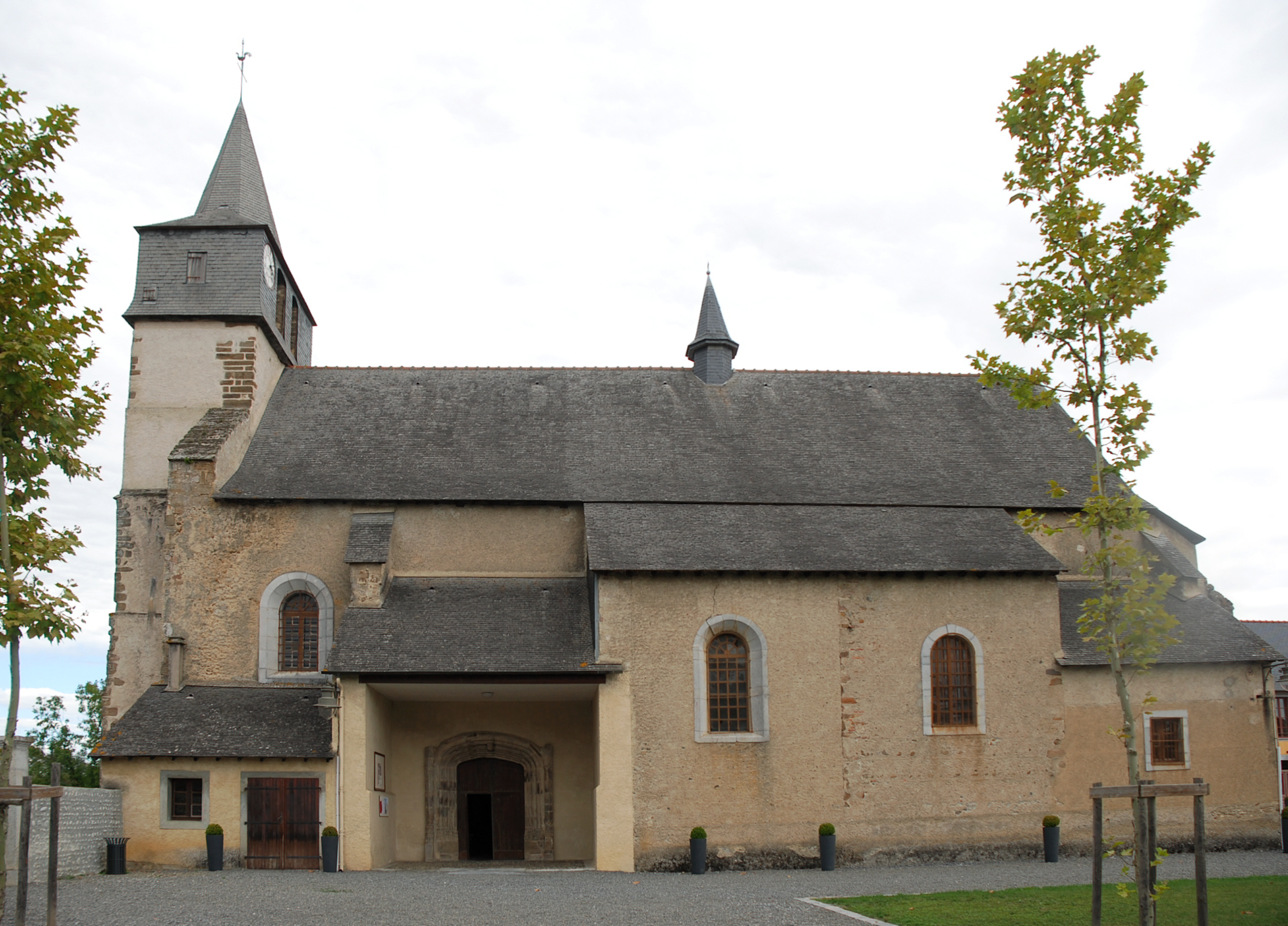 Eglise d'Azereix, Hautes-Pyrénées